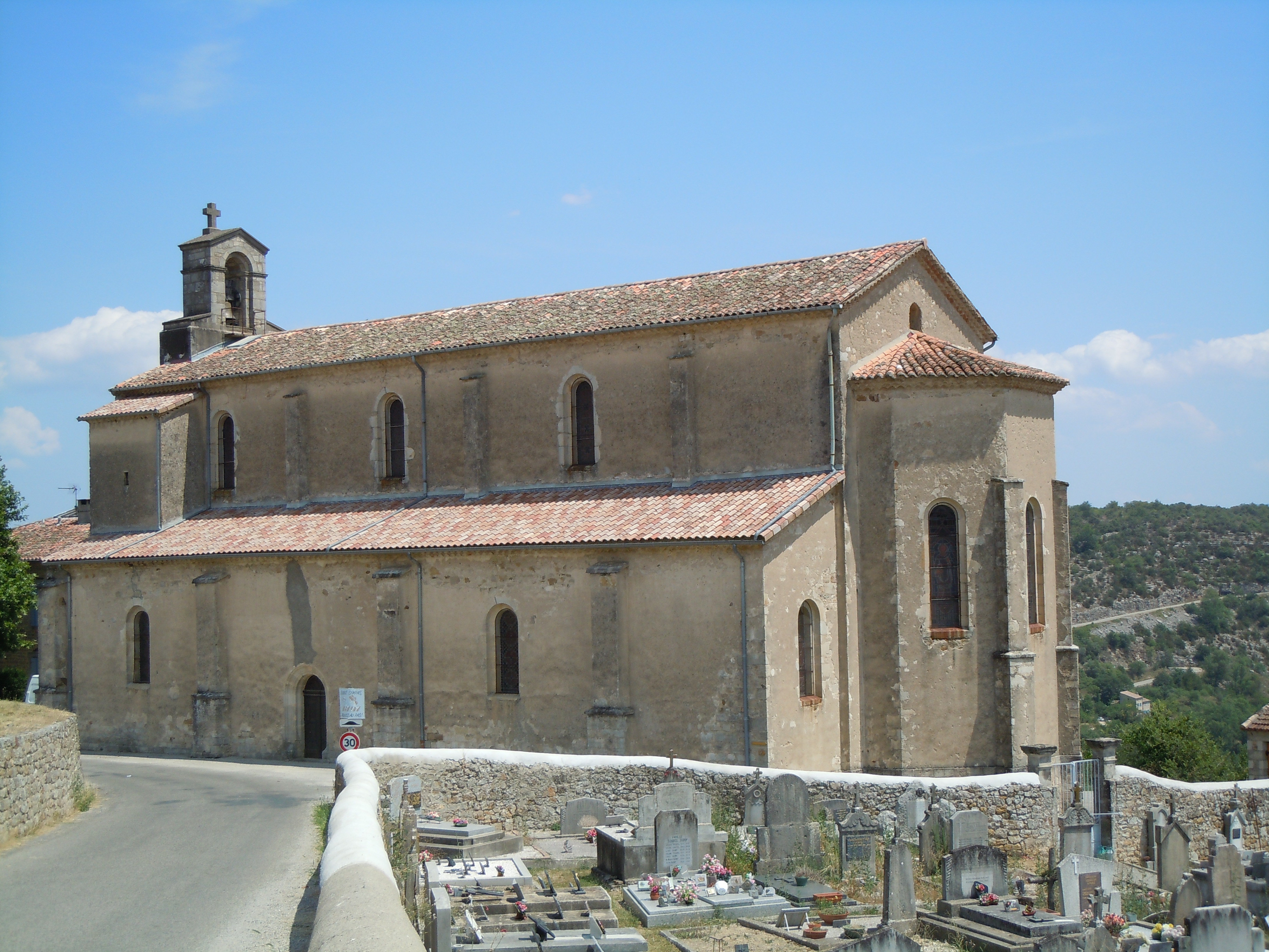 Eglise Saint-Apollinaire - Les Assion - France